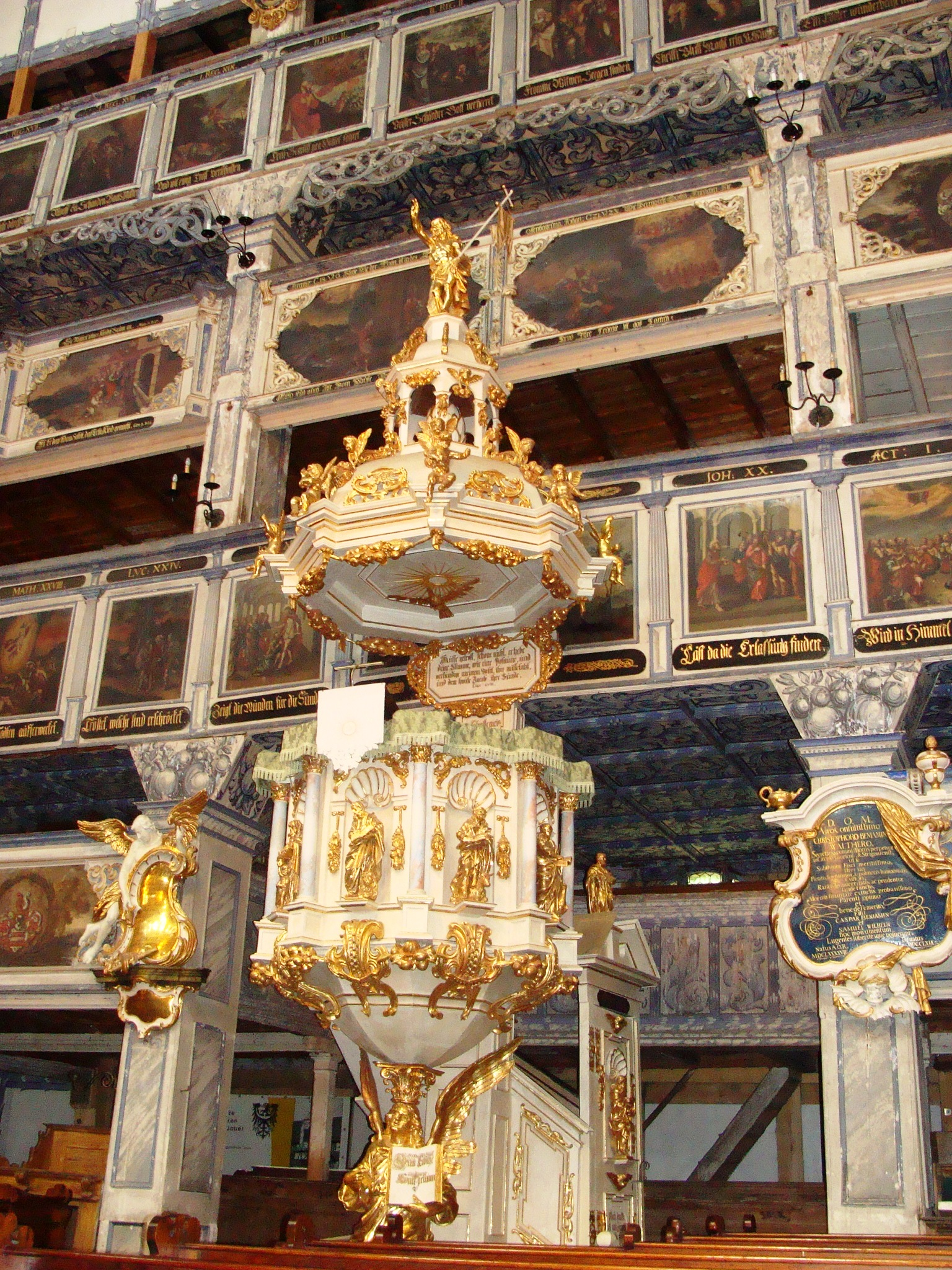 Jawor, kościół ewangelicki (Pokoju), 1654-1656, 1709